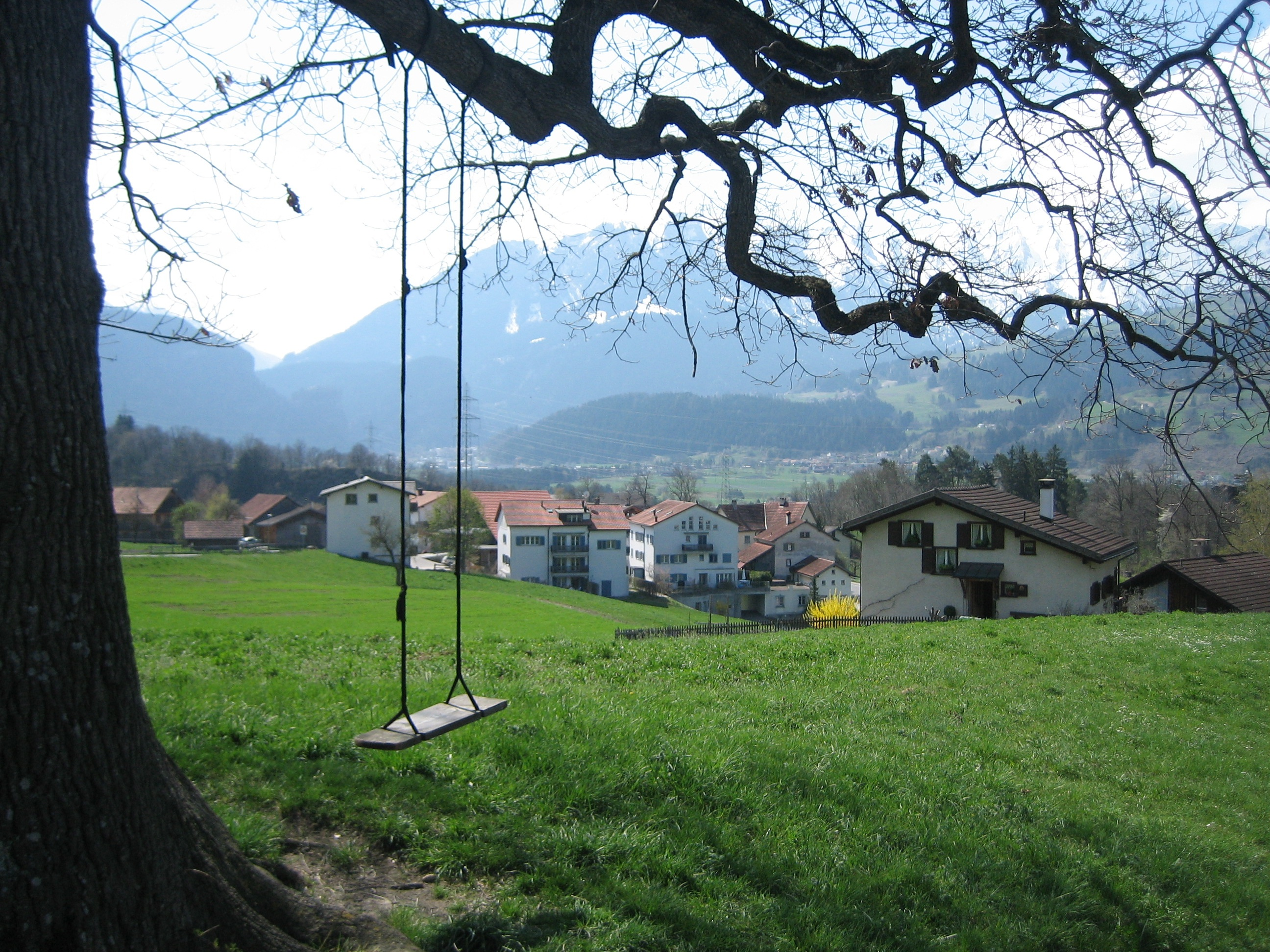 Pratval